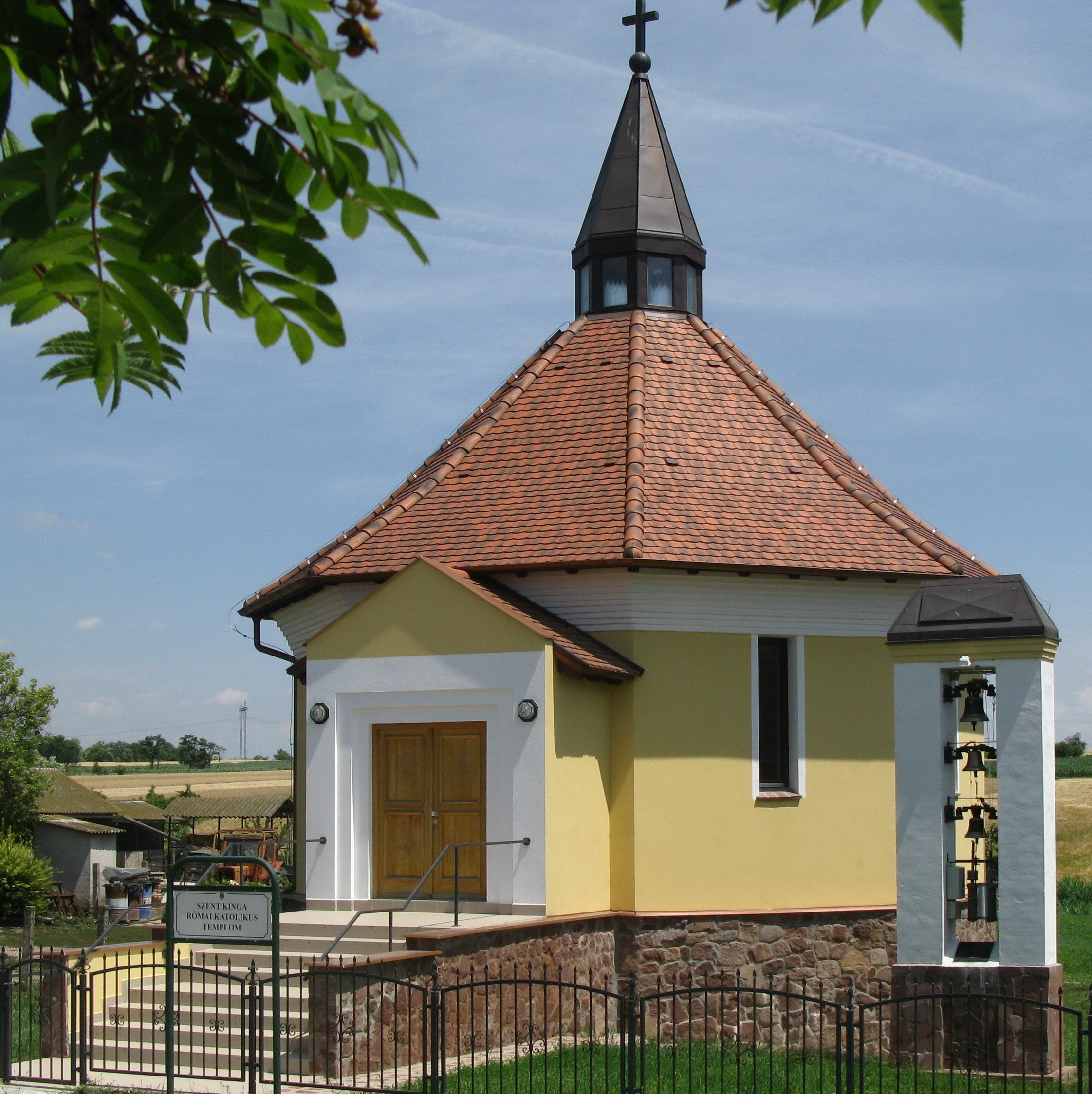 Szent Kinga-kápolna, Küngös, Veszprém megye